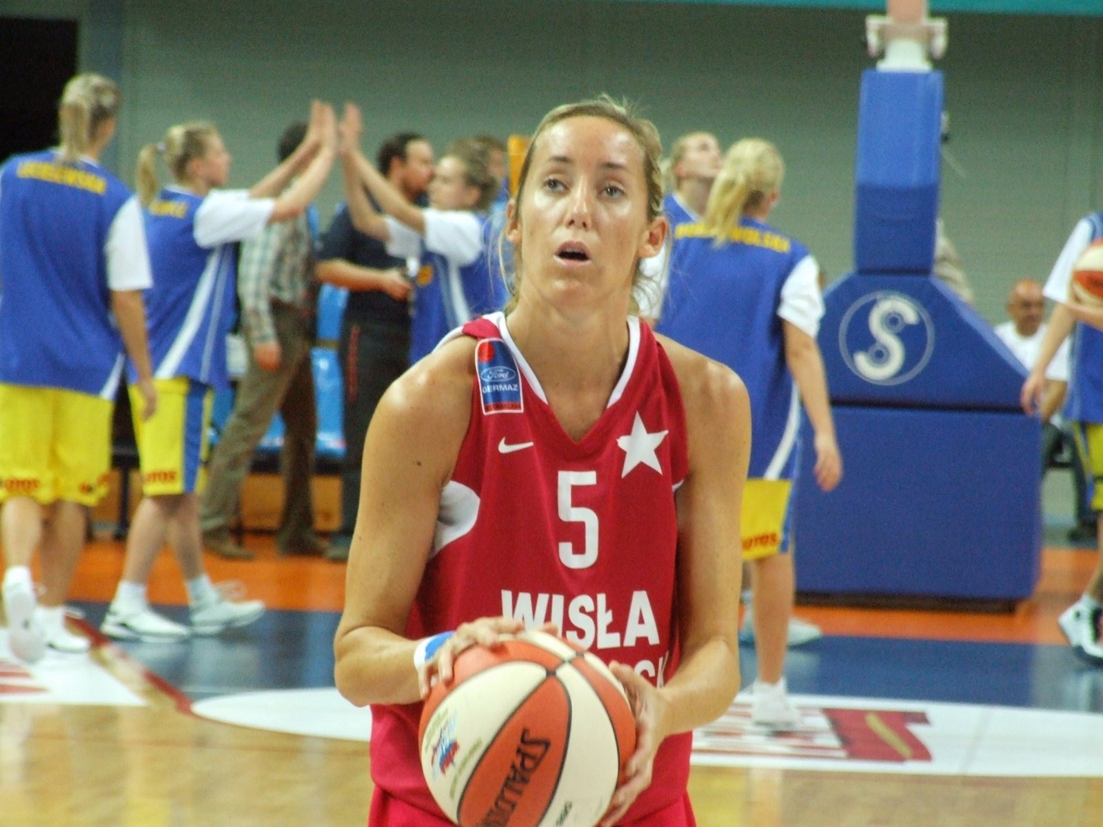 Marta Fernandez w barwach Wisły Kraków